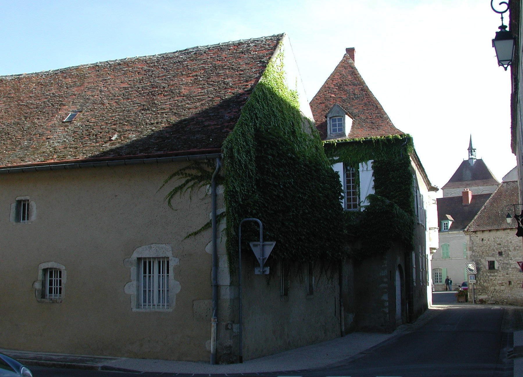 Ébreuil (Allier). Maison du XVe siècle. Communs et façade sur la rue Notre-Dame.